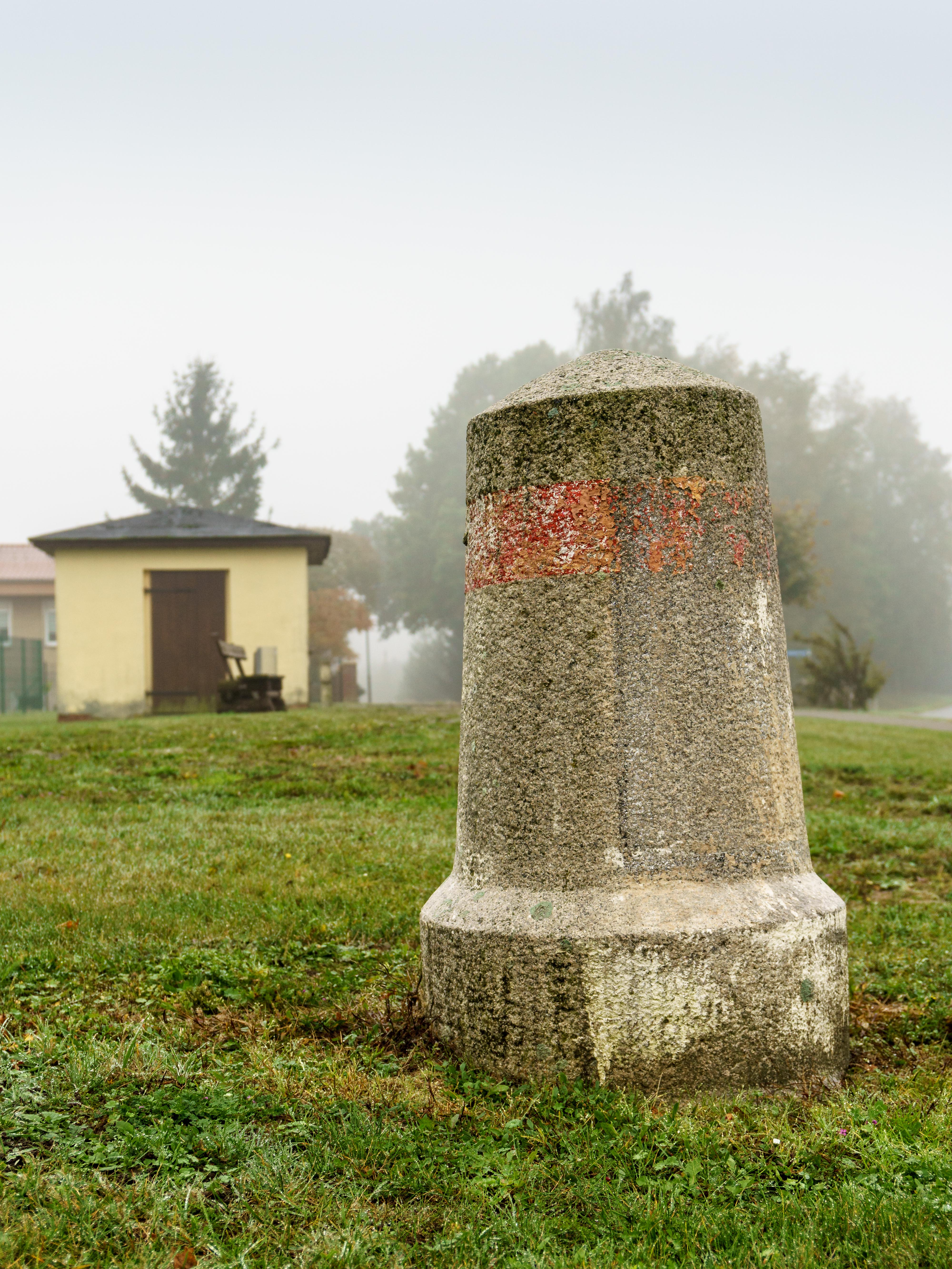 Preußischer Rundsockelstein (1202) an der L 9, Kreuzung L 1012 in Heiligenfelde.